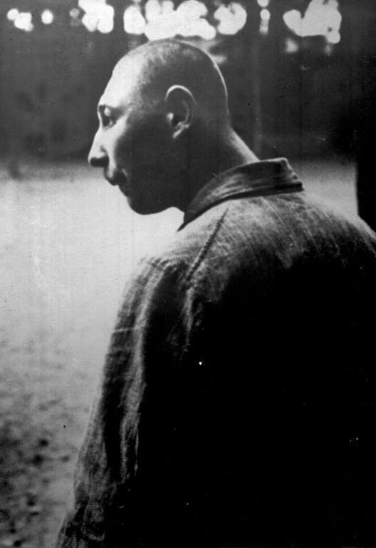 This description has been identified as biased or incorrect: Original description is from Nazi era, and among other things, it emphasizes the annual cost of treating this mentally ill person, consistent with later Nazi propaganda directed against the mentally ill.Erbkrank! Eine interessante Ausstellung zur Aufklärung des Volkes über erbgesunden Nachwuchs wurde vom Reichsausschuss für Volksgesundheitsdienst in Berlin eröffnet! Ein unheilbarer gemeingefährlicher Geisteskranker. Dieser Erbkranke kostet dem Staat 2000 Mark jährlich.